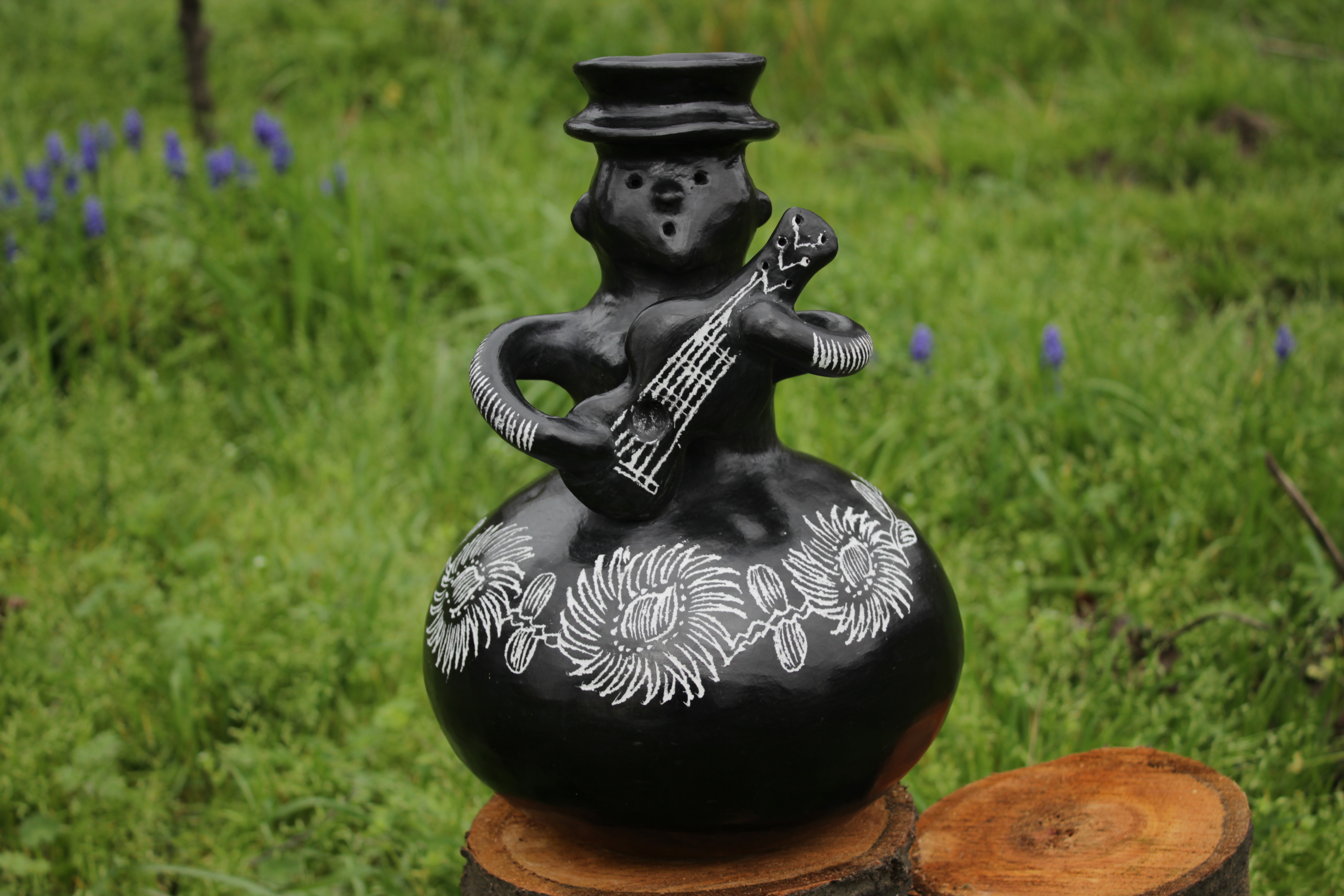 Pieza de artesanía elaborada en greda negra por las artesanas de Quinchamalí